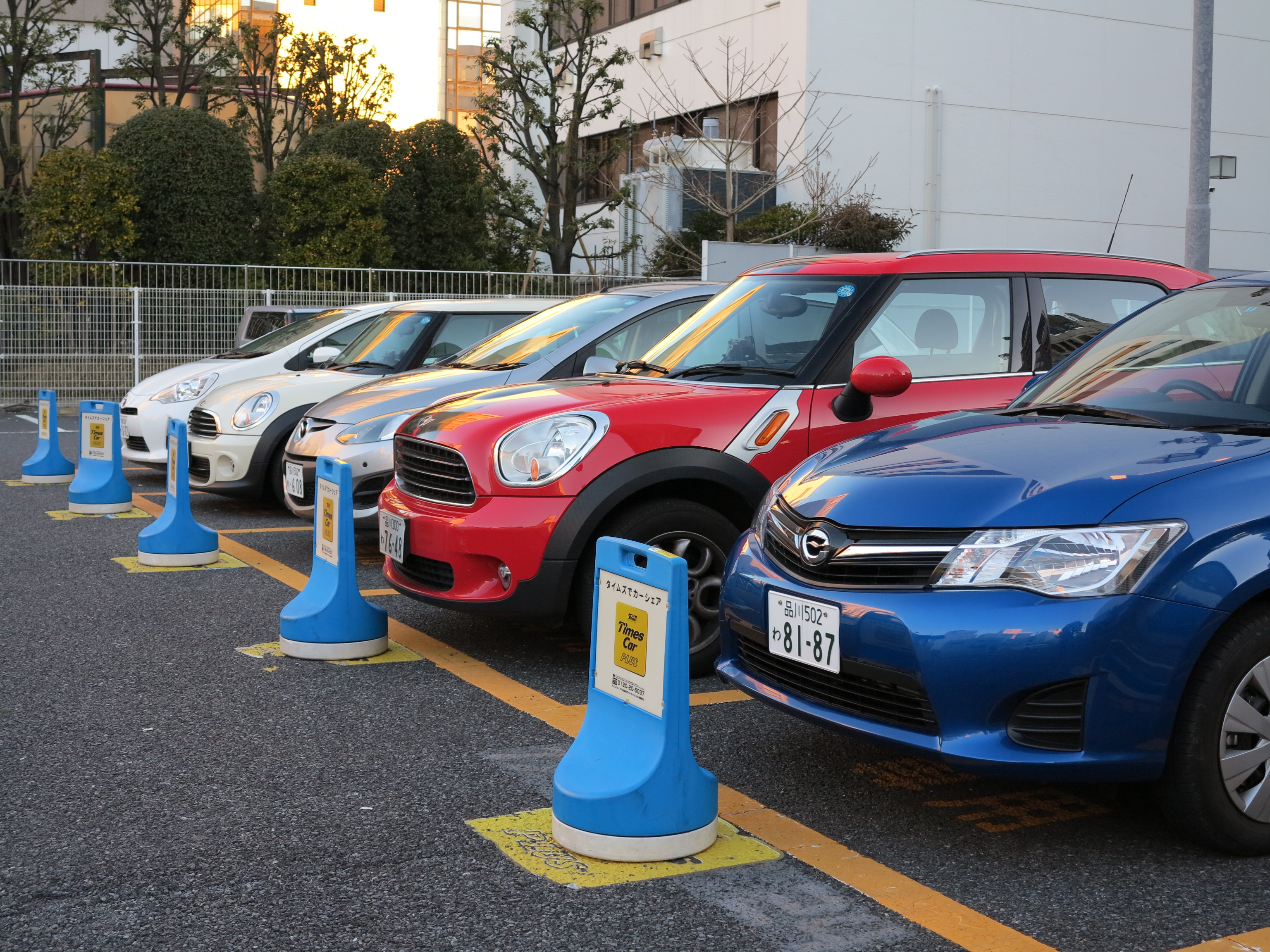 Carsharing station of Times Car Plus, Shibuya, Tokyo, Japan (Docomo Tower side Station) / 東京都渋谷区のタイムズカープラスのカーシェアリングステーション（ドコモタワーサイドステーション）